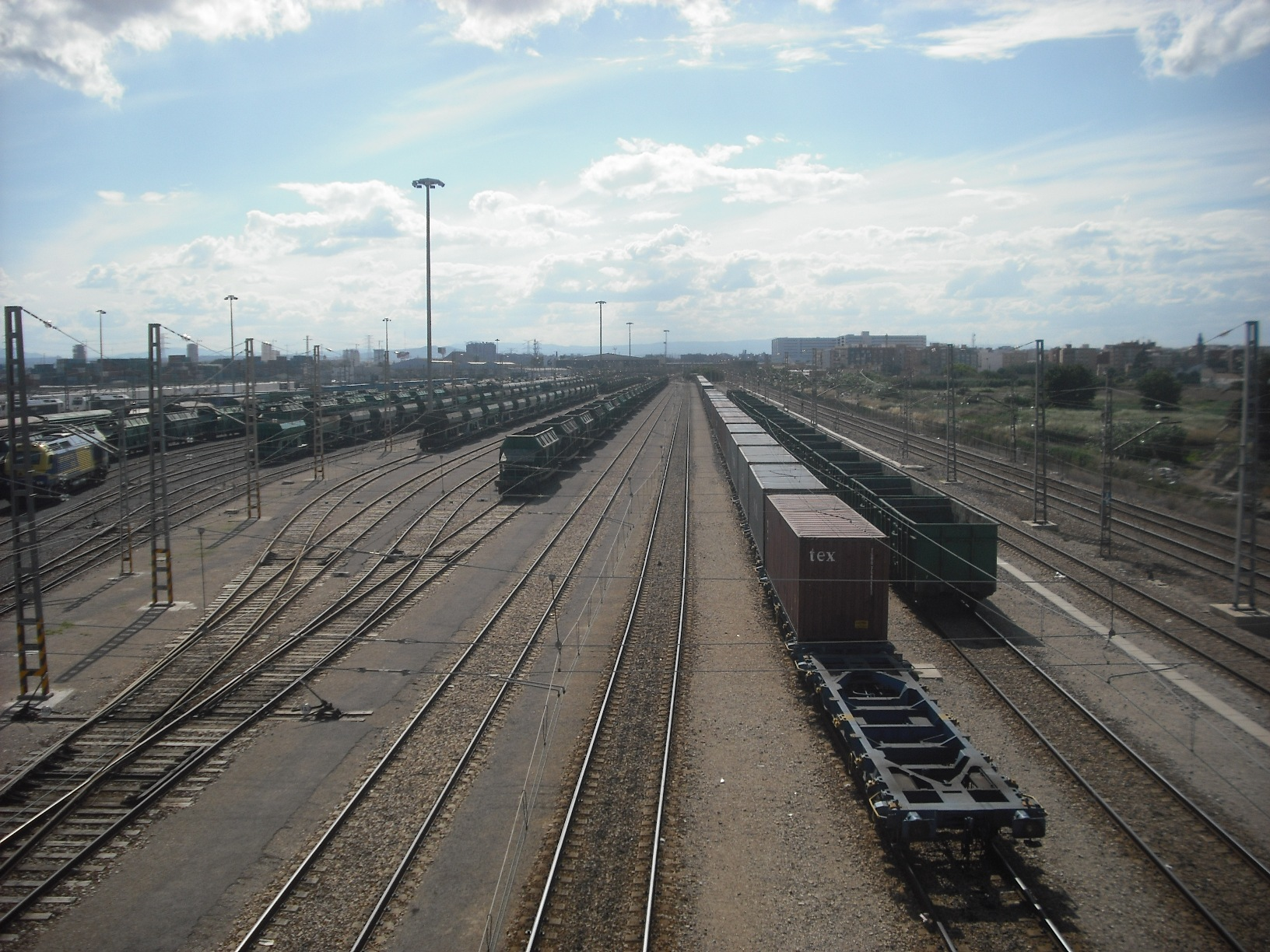 Estació de classificació de la Fonteta de Sant Lluís